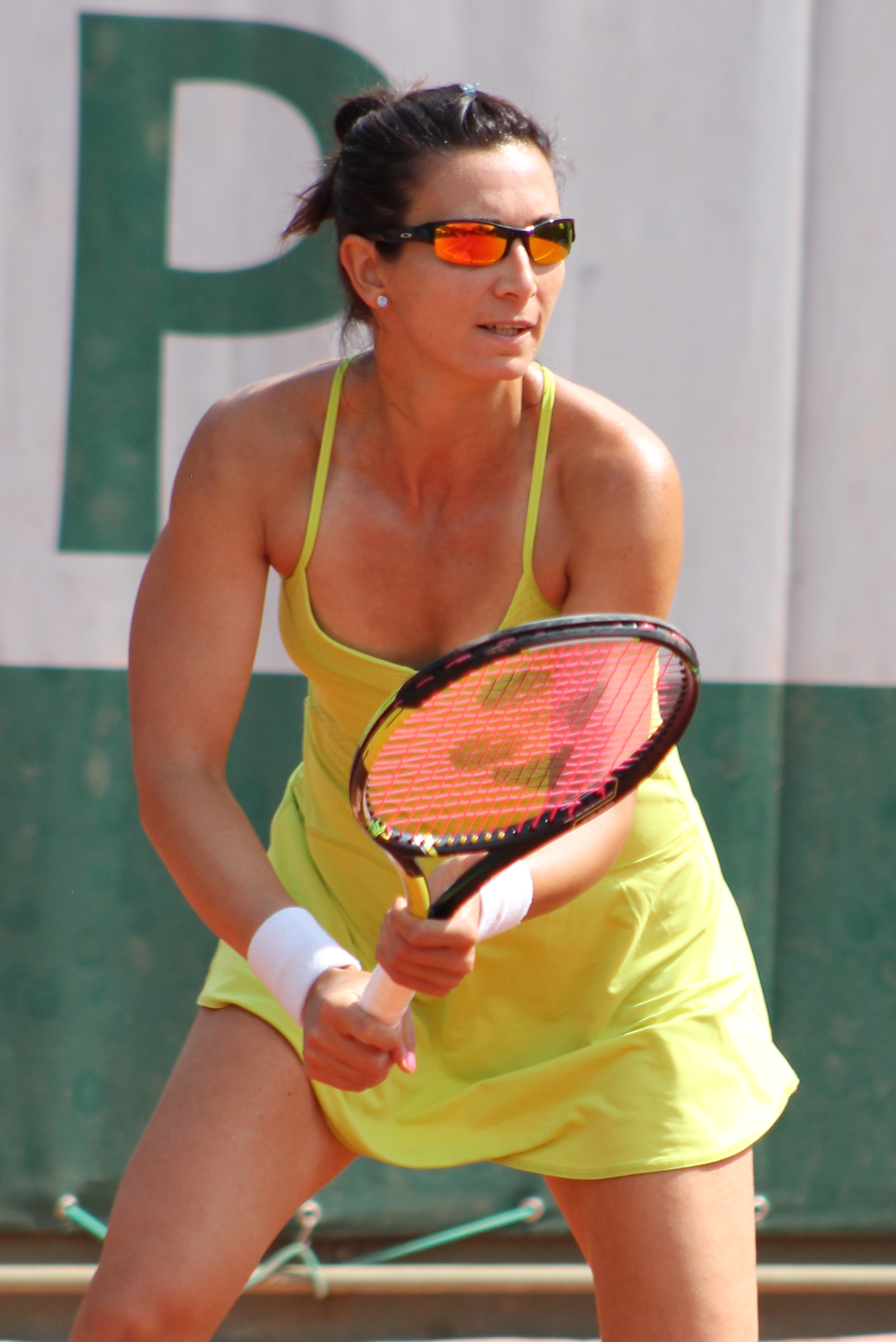 Jurak RG15 (2)